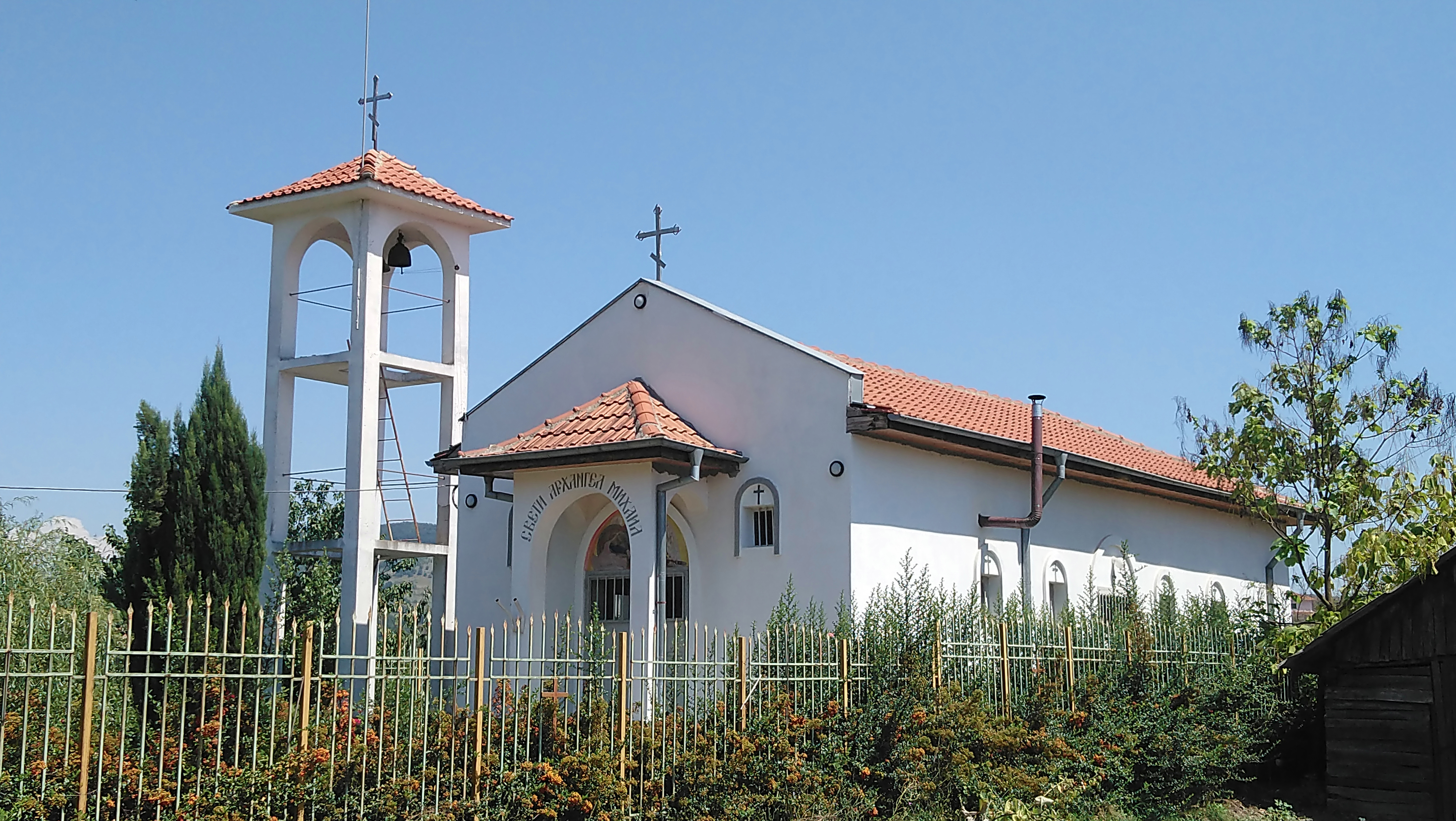 Храм "Св. Арх. Михаил", Дъскотна